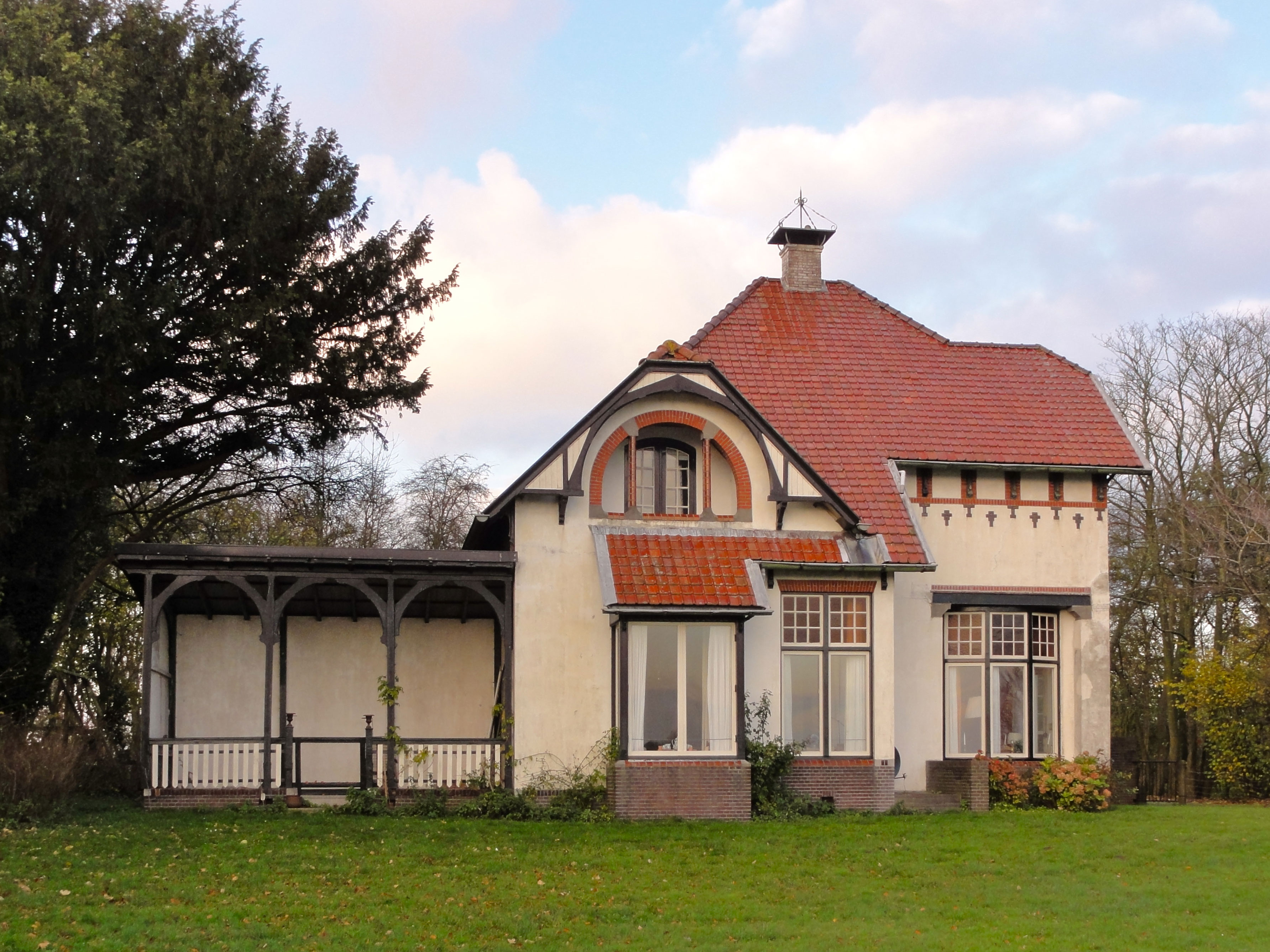 Woonhuis Hoofdstraat 33 in Leens